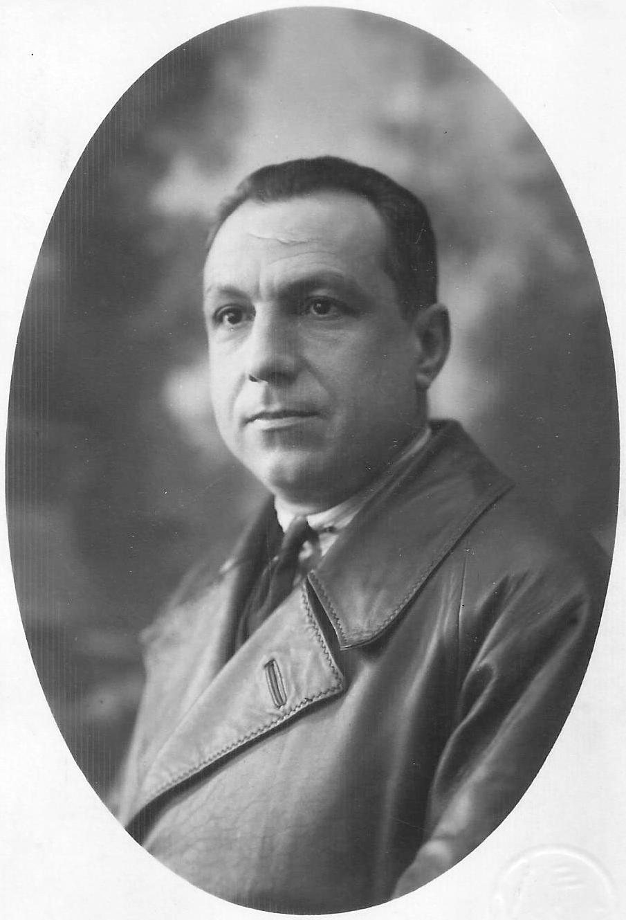 Roberto Blanco Torres 1891-1936